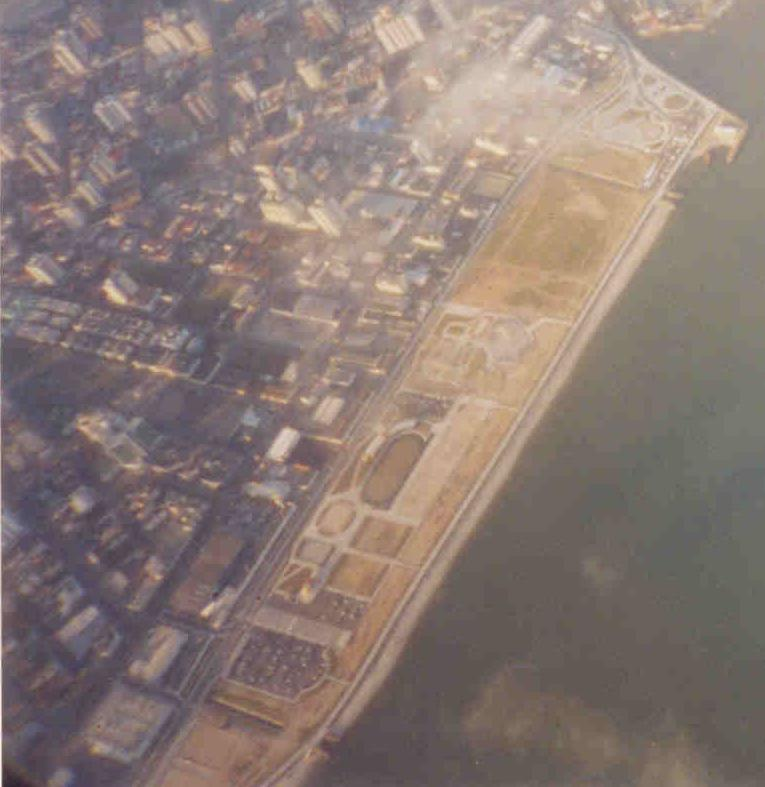 São José, Estado de Santa catarina, Brasil: Aterro da baía sul